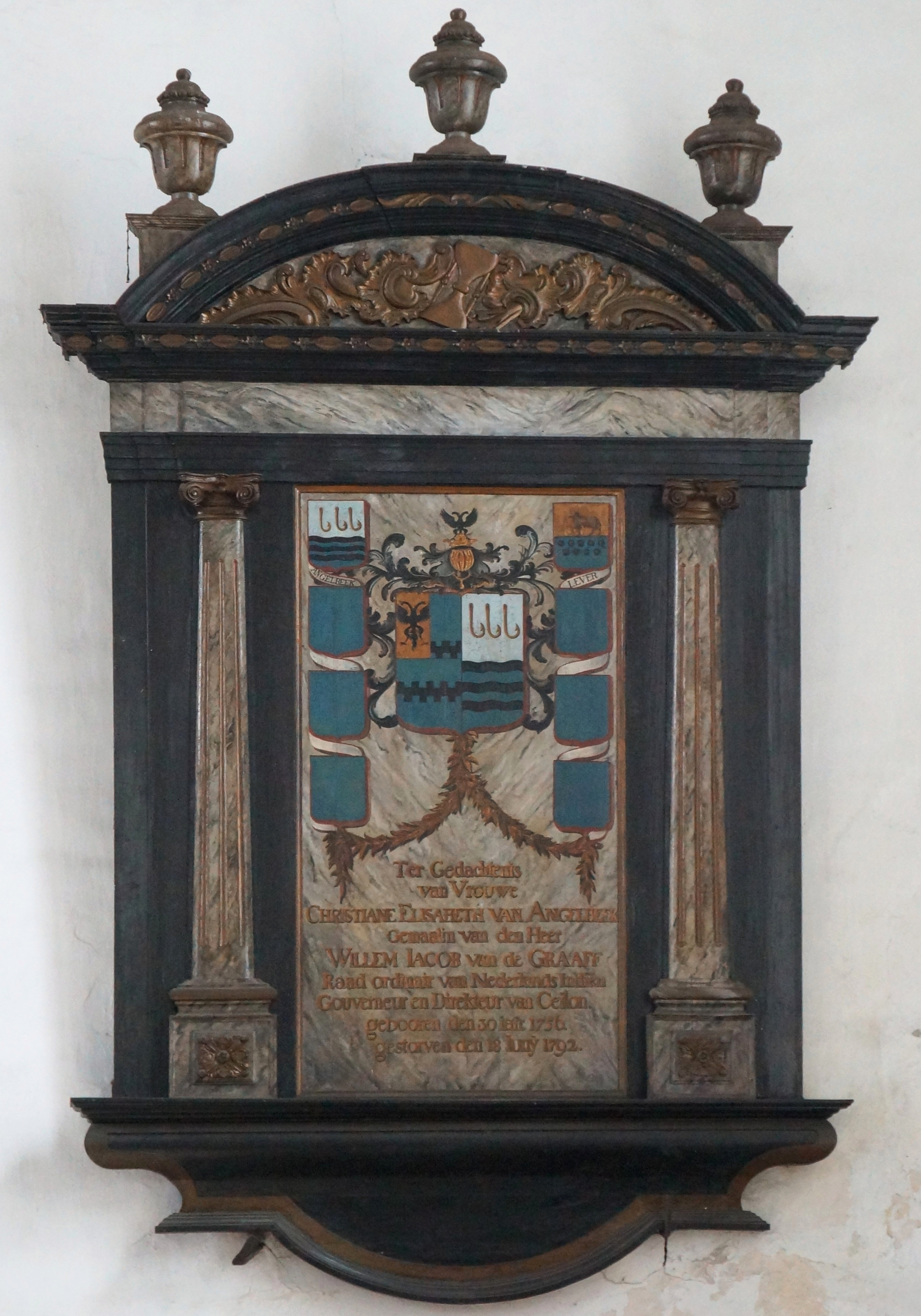 Ex voto à la mémoire de Lady Christina Elisabeth Ange Heek épouse du gouverneur Willem Jacob van De Graff dans l'église protestante Wolfendhal construite par les Hollandais en 1749., Colombo Province du Sud - Sri Lanka